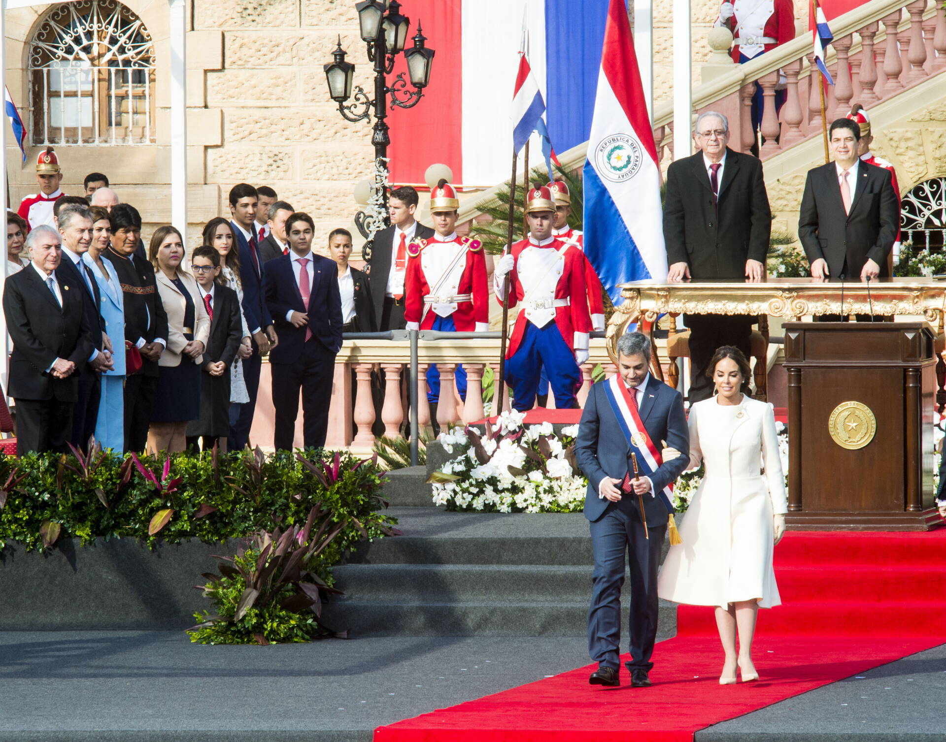 El presidente Mauricio Macri asistió a la ceremonia de asunción del nuevo presidente de Paraguay, Mario Abdo Benítez, y ratificó "la vocación de seguir trabajando juntos por el bien de nuestros pueblos".